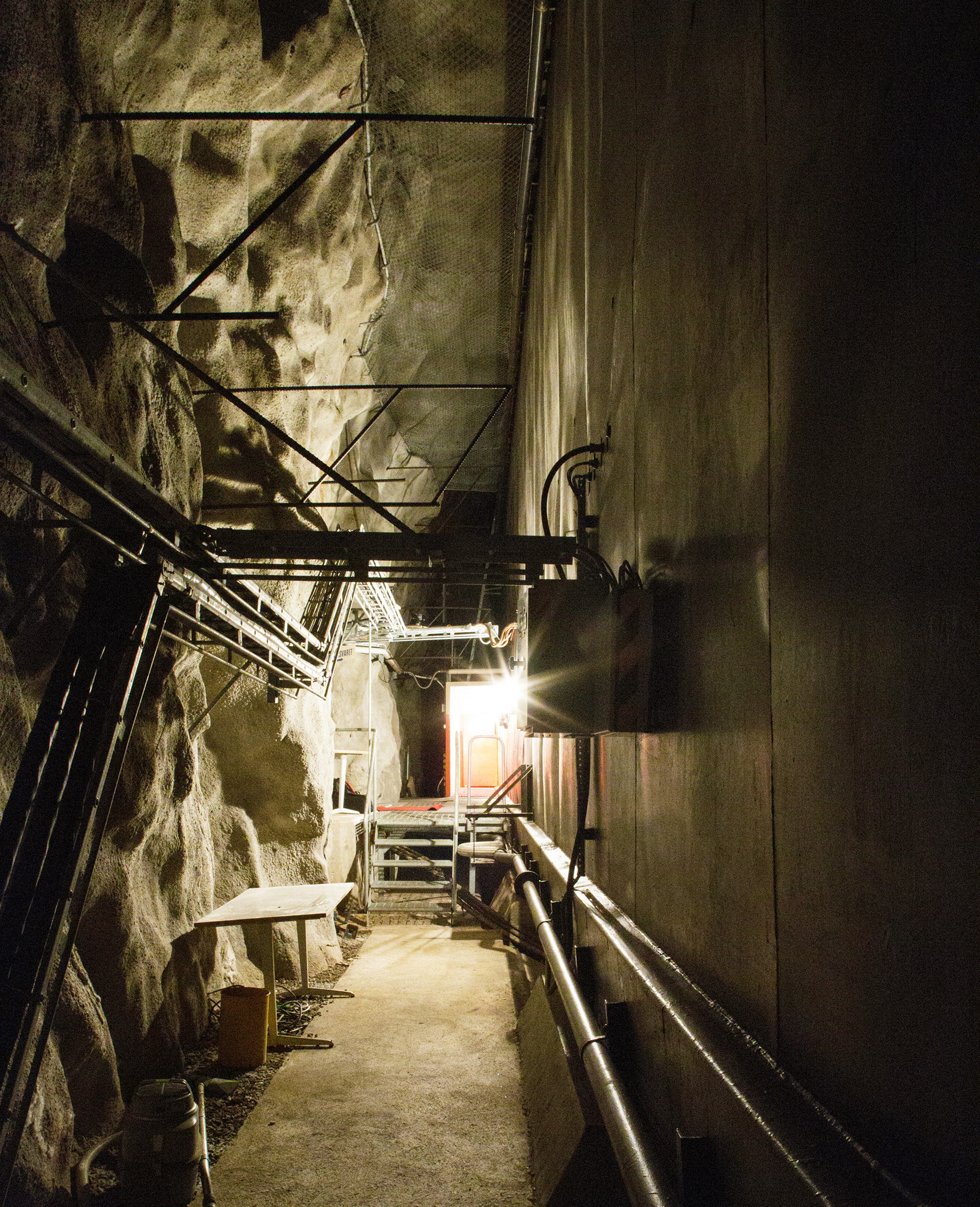 Ledningscentralen Elefanten, Sollentuna